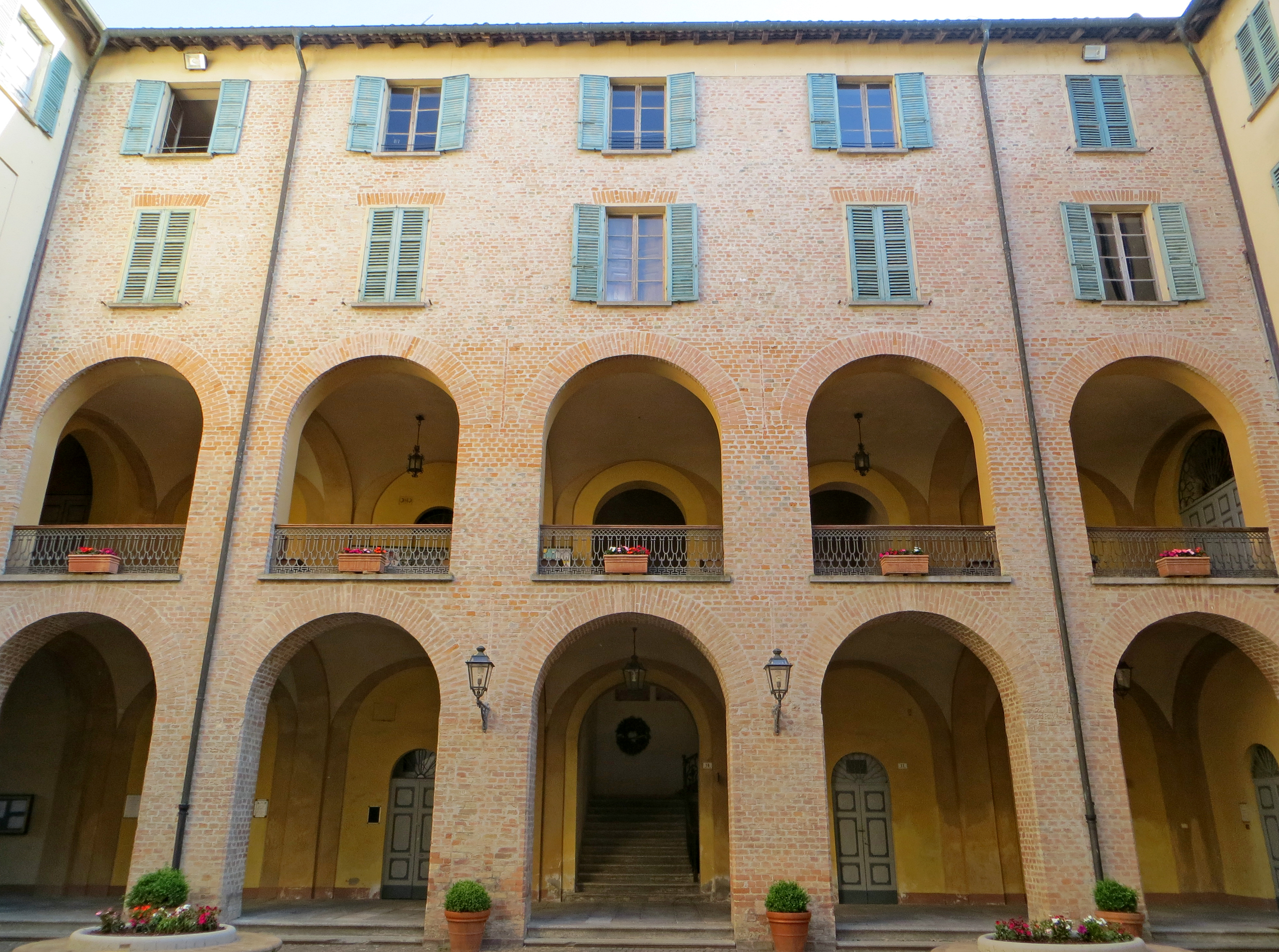 Rocca Pallavicino (Busseto) - lato sud del cortile interno This is a photo of a monument which is part of cultural heritage of Italy.